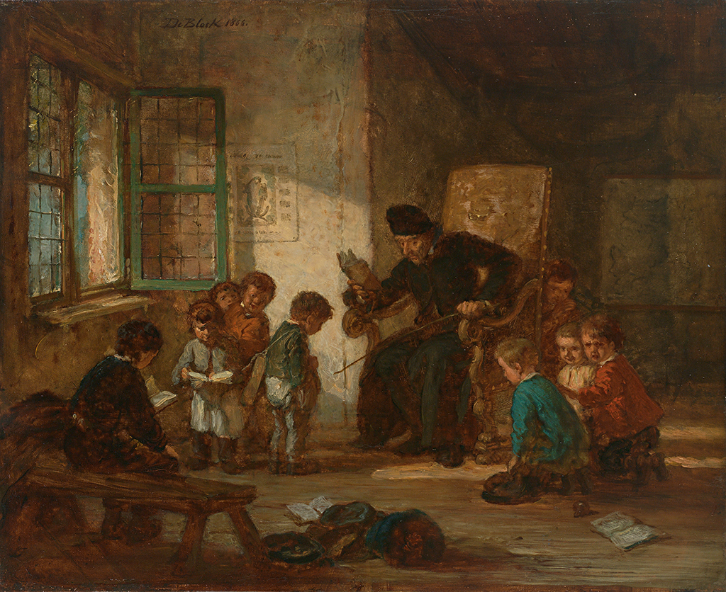 Lehrer in einer Grundschulklasse. Öl/Holz. 25,5 x 31 cm. Sign. und 1866 dat.